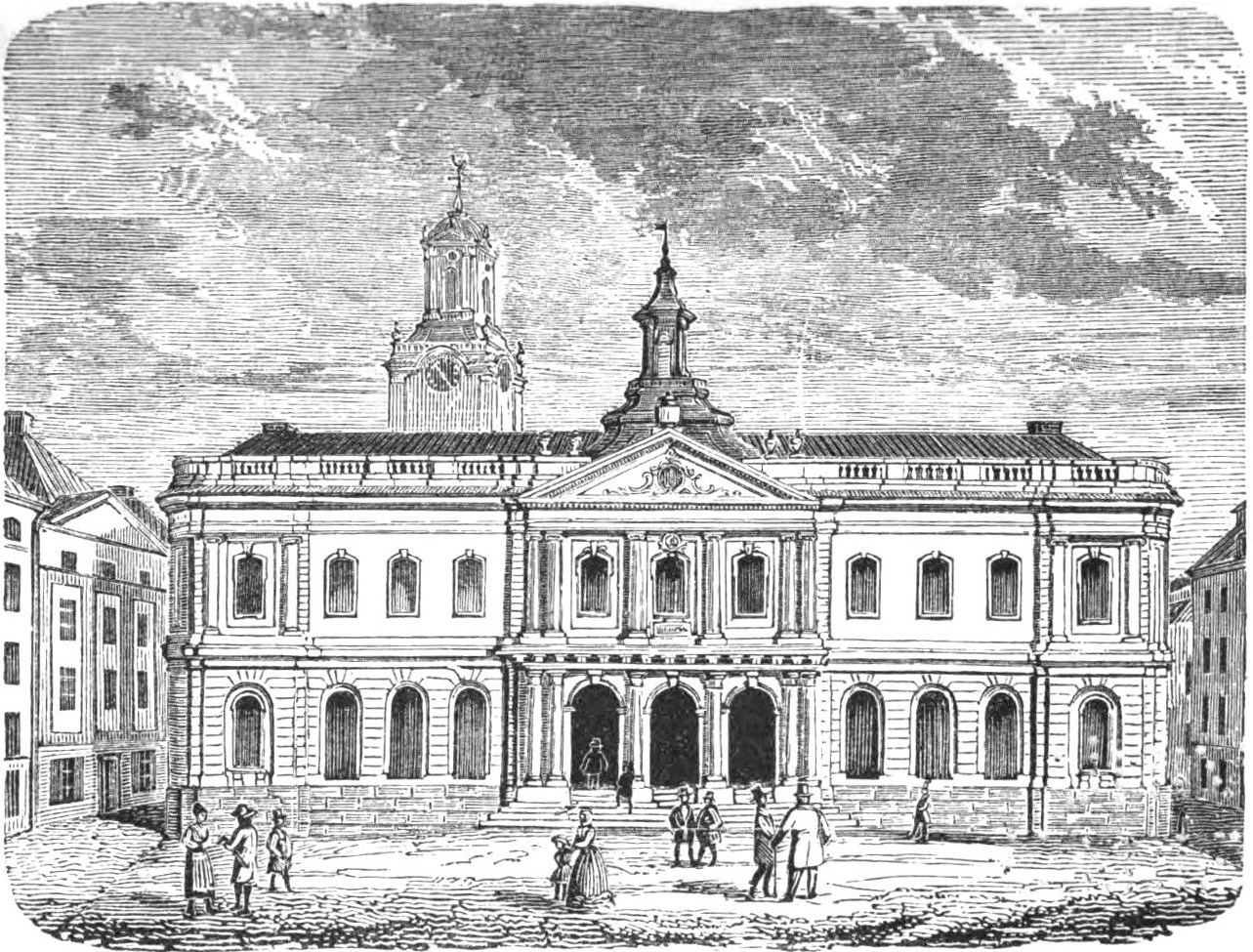 Börsen på Stortorget i Gamla stan, Stockholm.